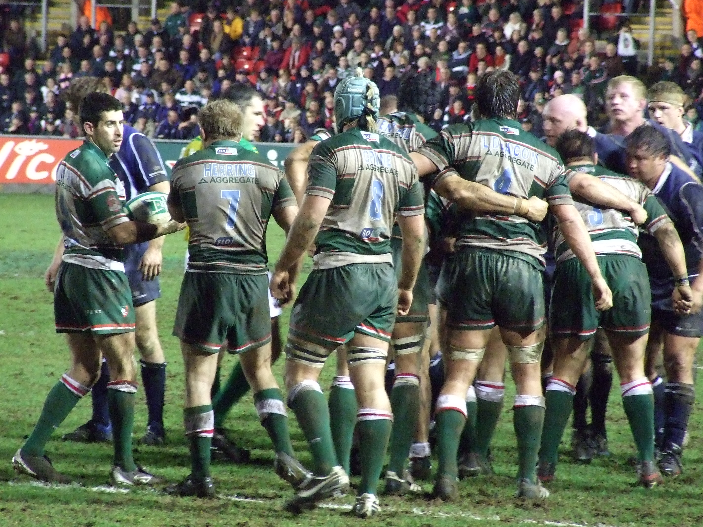 Leicester Tigers v Leinster - 19 January 2008 (108) - Poule 6 6°journée Heineken Cup - Welford Road, Leicester Leicester Tigers 25 - 9 Leinster